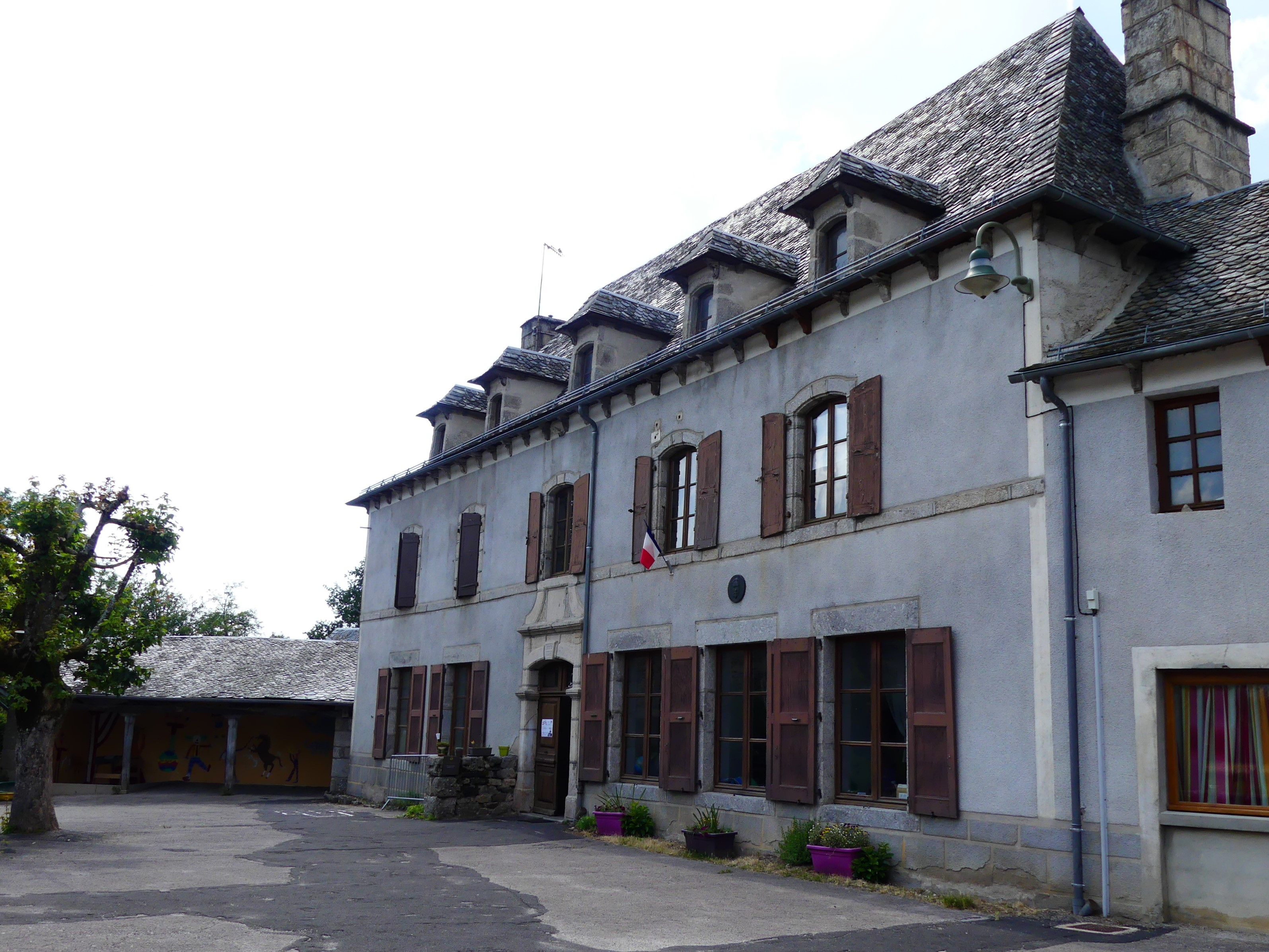 La mairie d'Huparlac, Aveyron, France.